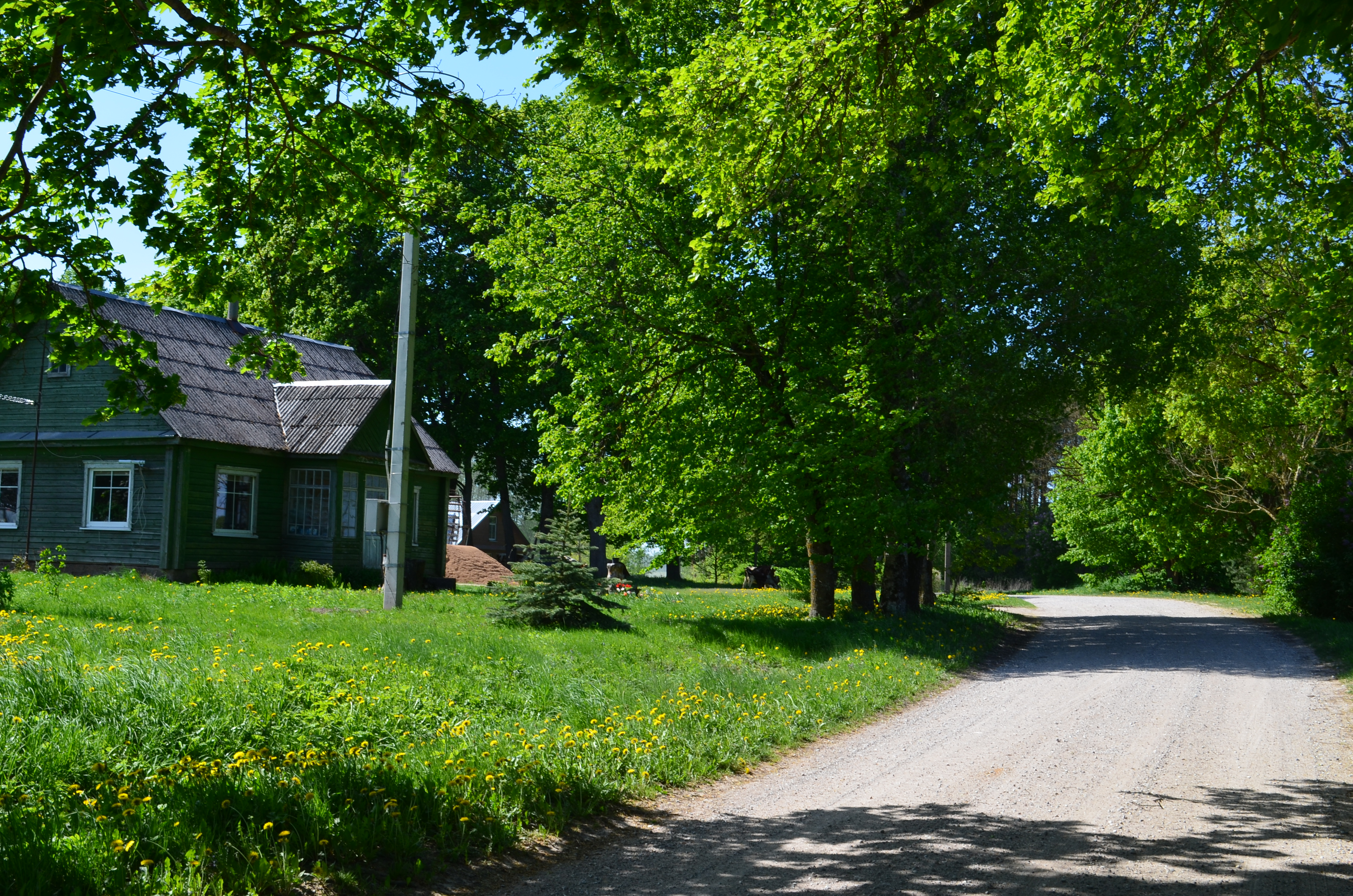 Plaštaka, Kurklių sen., Anykščių raj.